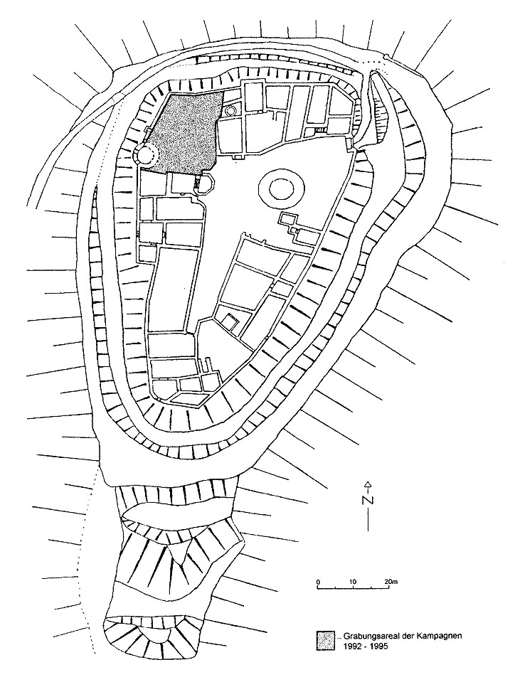 Grundriss Burg Henneberg mit Angabe der Grabungen 1992-1995 (nach Schwarzberg 1996)